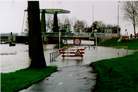 Wateroverlast Noordoostpolder 6-11-1998. Onderdoorgang Tollebekerbrug bij Tollebeek